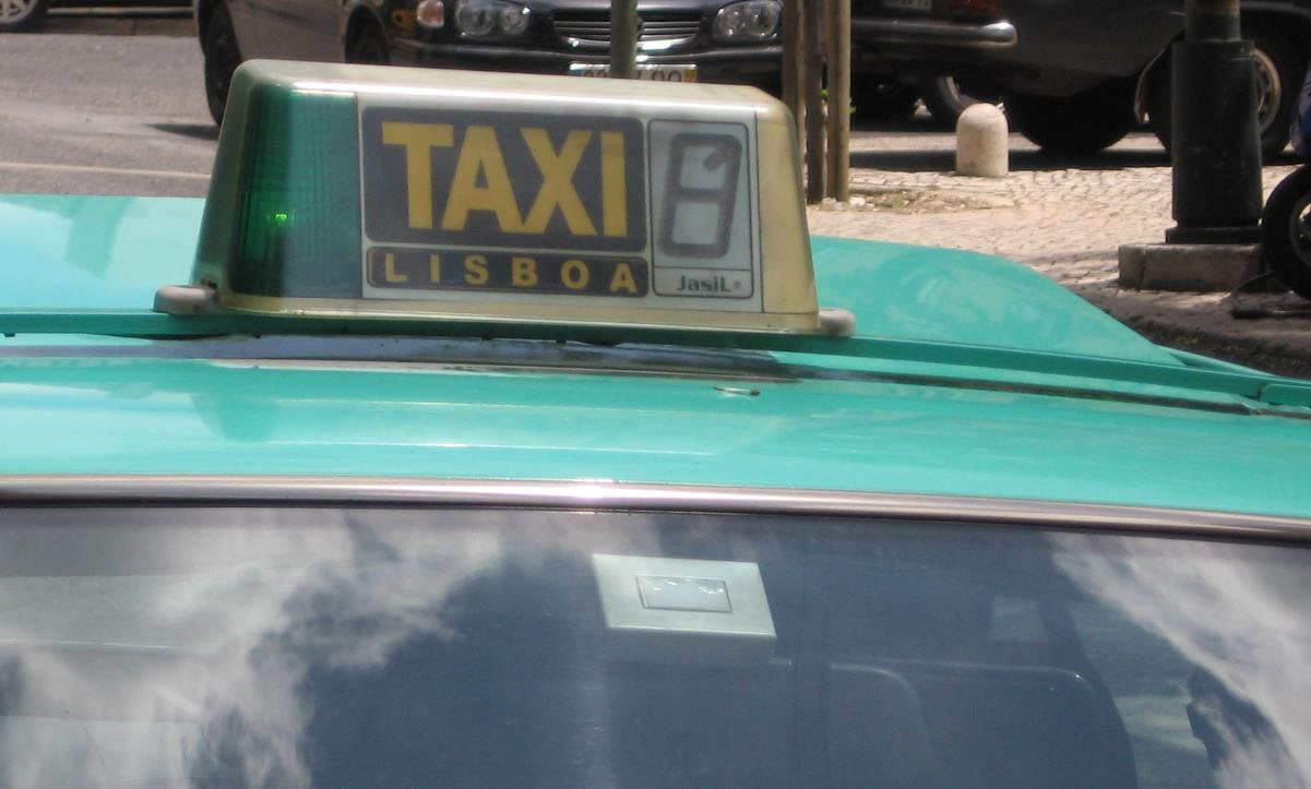 Letreiro de um táxi de Lisboa